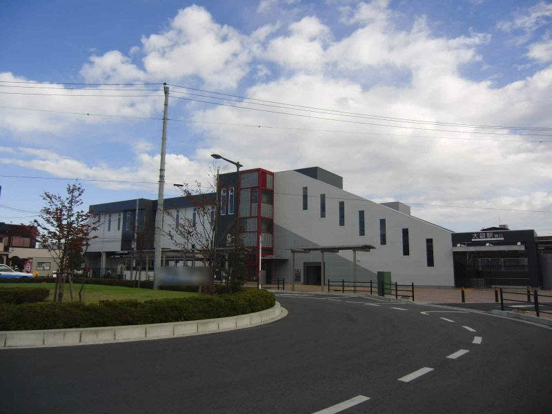 大袋駅西口の写真です。